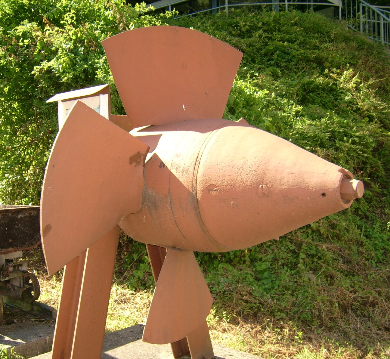 Kaplanturbine an der Staustufe in Mettlach